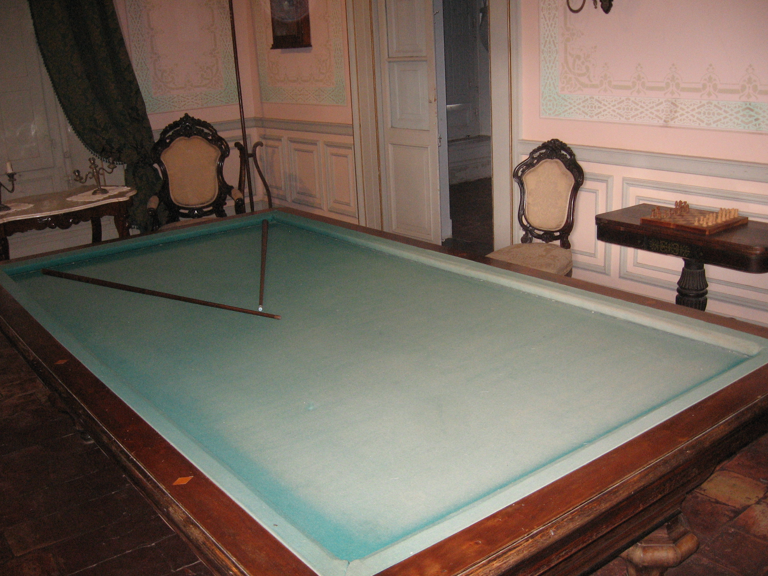 Mesa de billar del Palacio San José